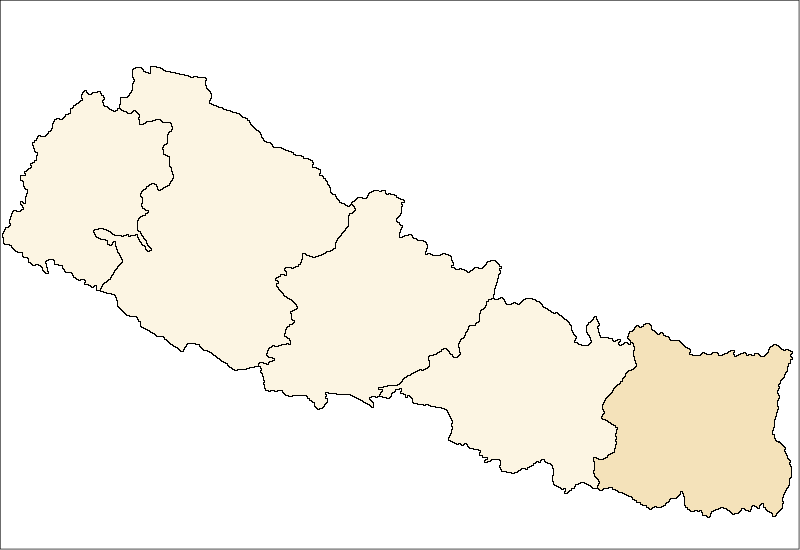 FrenchCarte de localisation de larégion de développement East(wp-FR),au Népal (wp-FR).EnglishLocation map ofEast Region in Nepal (wp-EN).